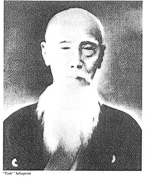 Satunuku "Tode" Sakugawa